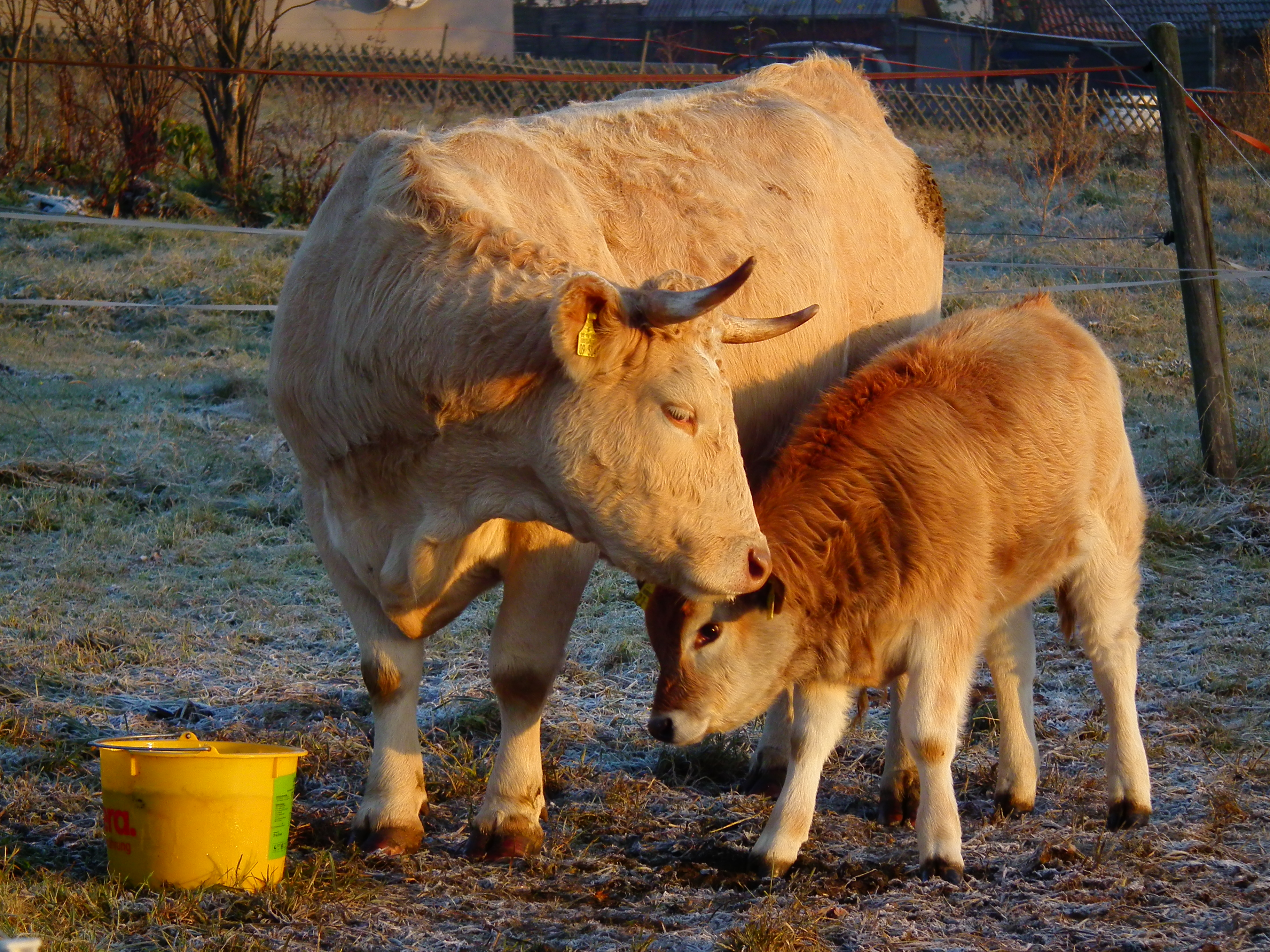 Kuh mit Kalb, fotografiert auf der Tromm (Hessen, Deutschland)